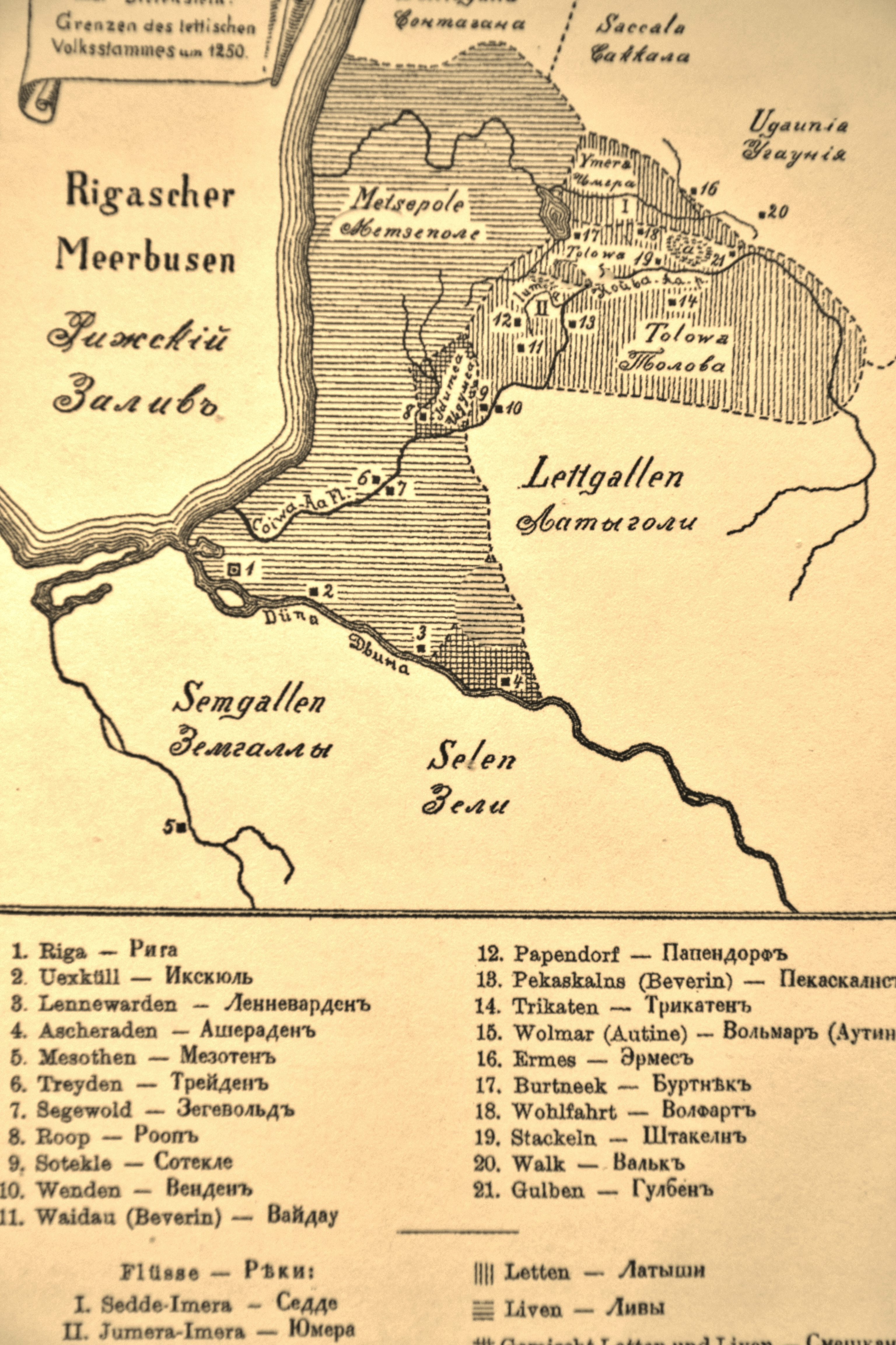 Ливонские ливы, идумийцы и Талавские латгалы к XIII середине века